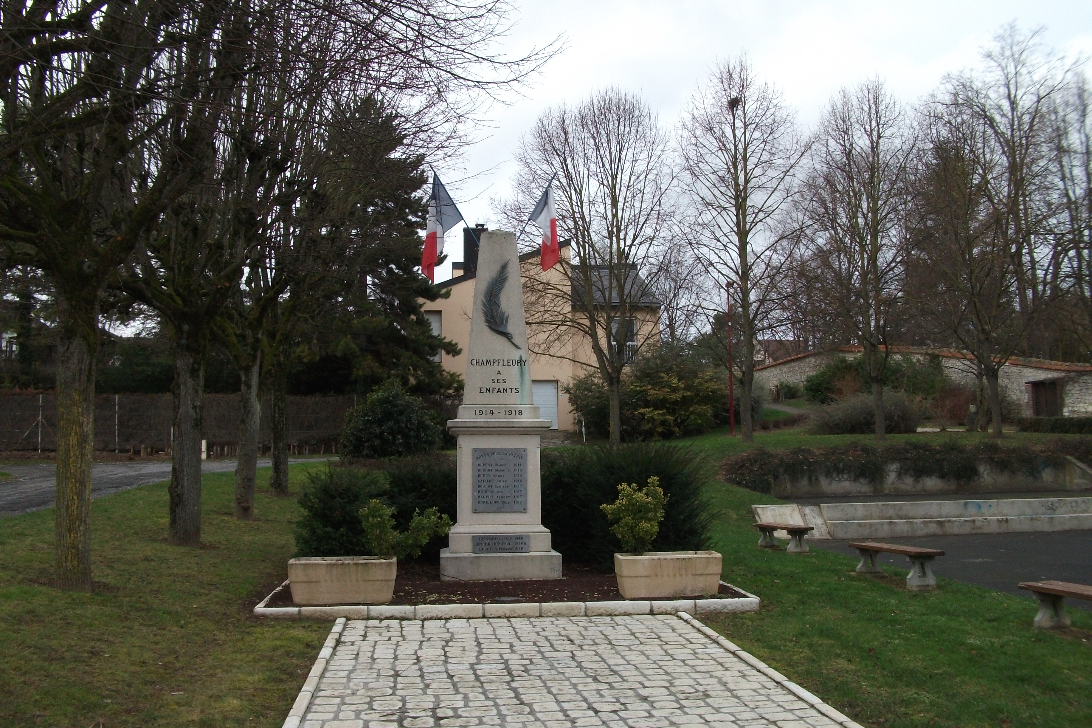 le monument aux mort du village de Champfleury.